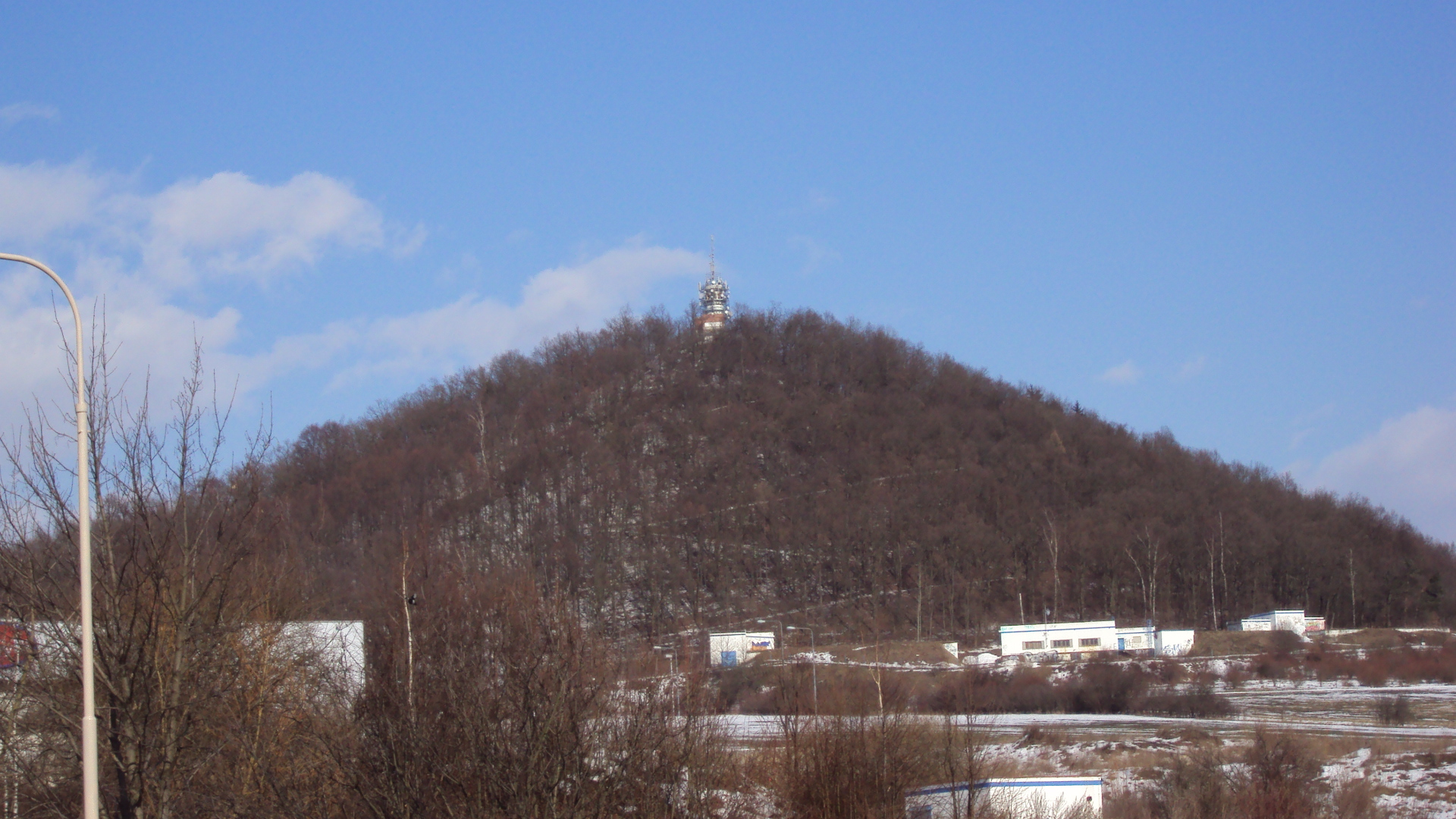 Česky: Kopec Špičák na okraji města, nahoře vysílač